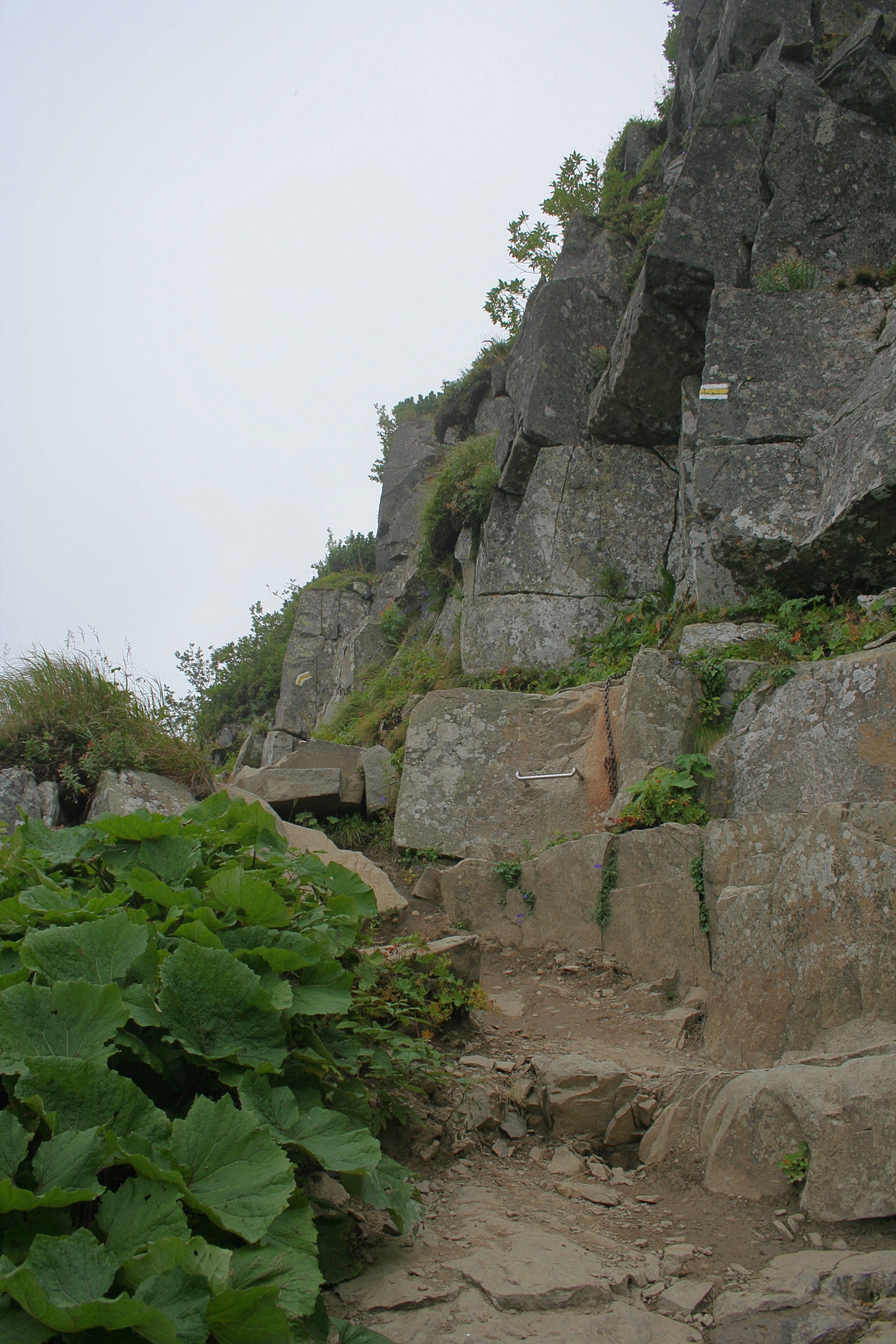 Szlak "Perć Akademików" na Babią Górę.